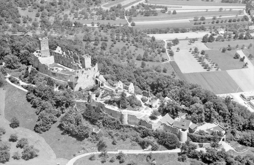 Lörrach: Burg Rötteln in einer Luftbildaufnahme von Westen